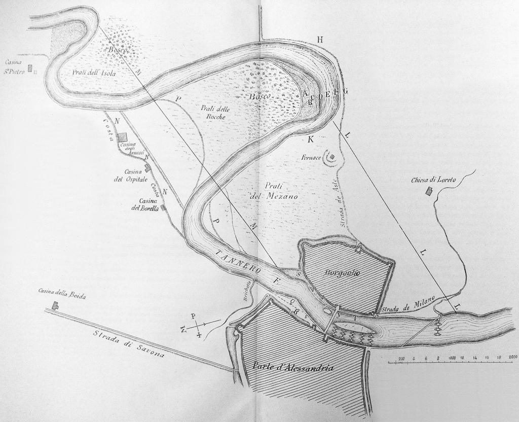 [...] Disegno giustamente con proportioni et Misure come è posta la Città d'Alessandria et Bergoglio, con il Fiume Tannero suo volgimento et corrusione con la campagna, casine et altri luoghi che hanno potuto capire in tanto spatio de disegno [...]. Progetto dell'ingegnere Giovanni Battista Clarici per i tagli da farsi al Tanaro, il quale minacciava di abbandonare la città. 1593 Bibliografia Edite a spese del Municipio di Alessandria da Francesco Gasparolo, Monumenta Alexandrina. Carte Alessandrine dell'Archivio di Stato di Milano, Stabilimento Cromo-Tipografico-Librario ditta G. M. Piccone. Alessandria, 1903.